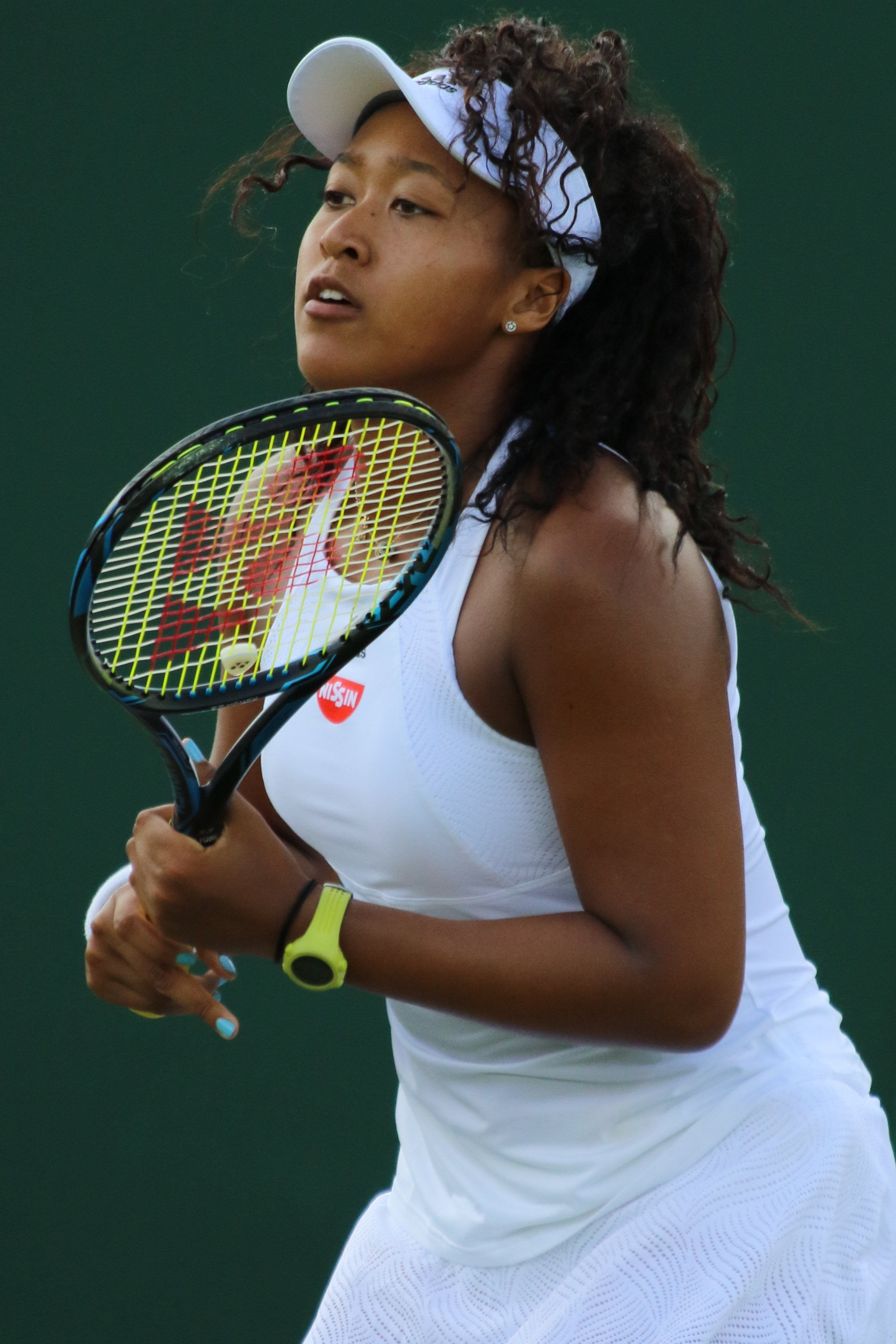 Osaka WM17 (4)